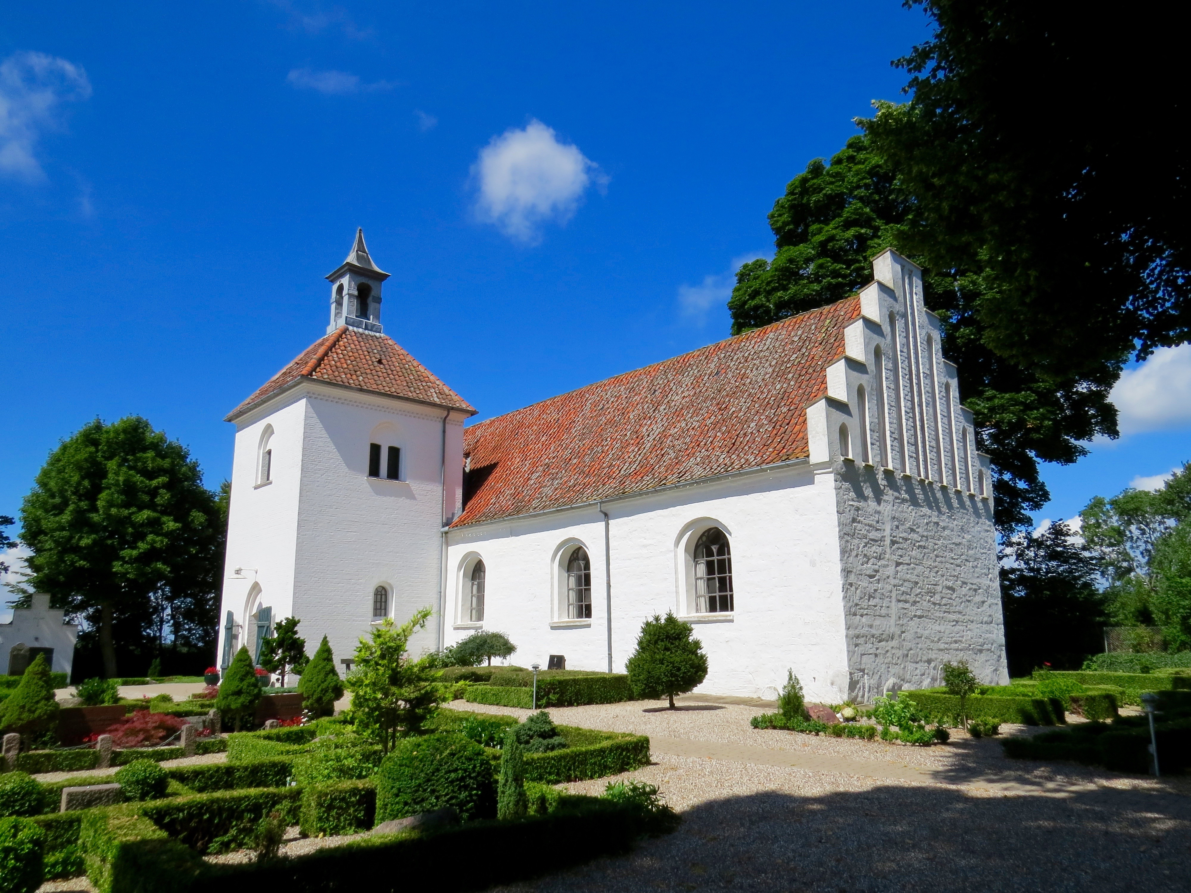 Kyndby Kirke i Kyndby, Hornsherred